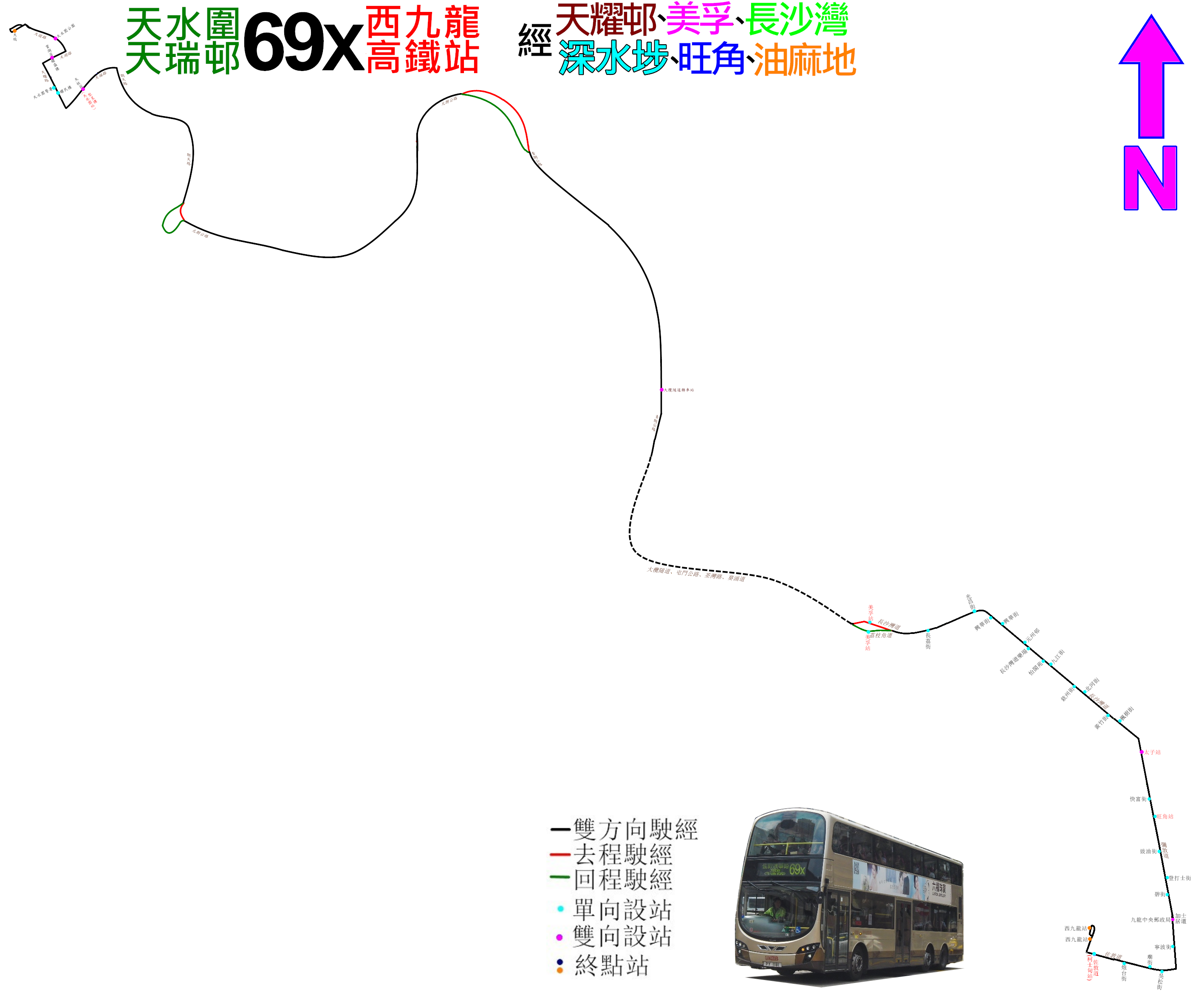 中文（香港）: 九巴69X線的走線圖